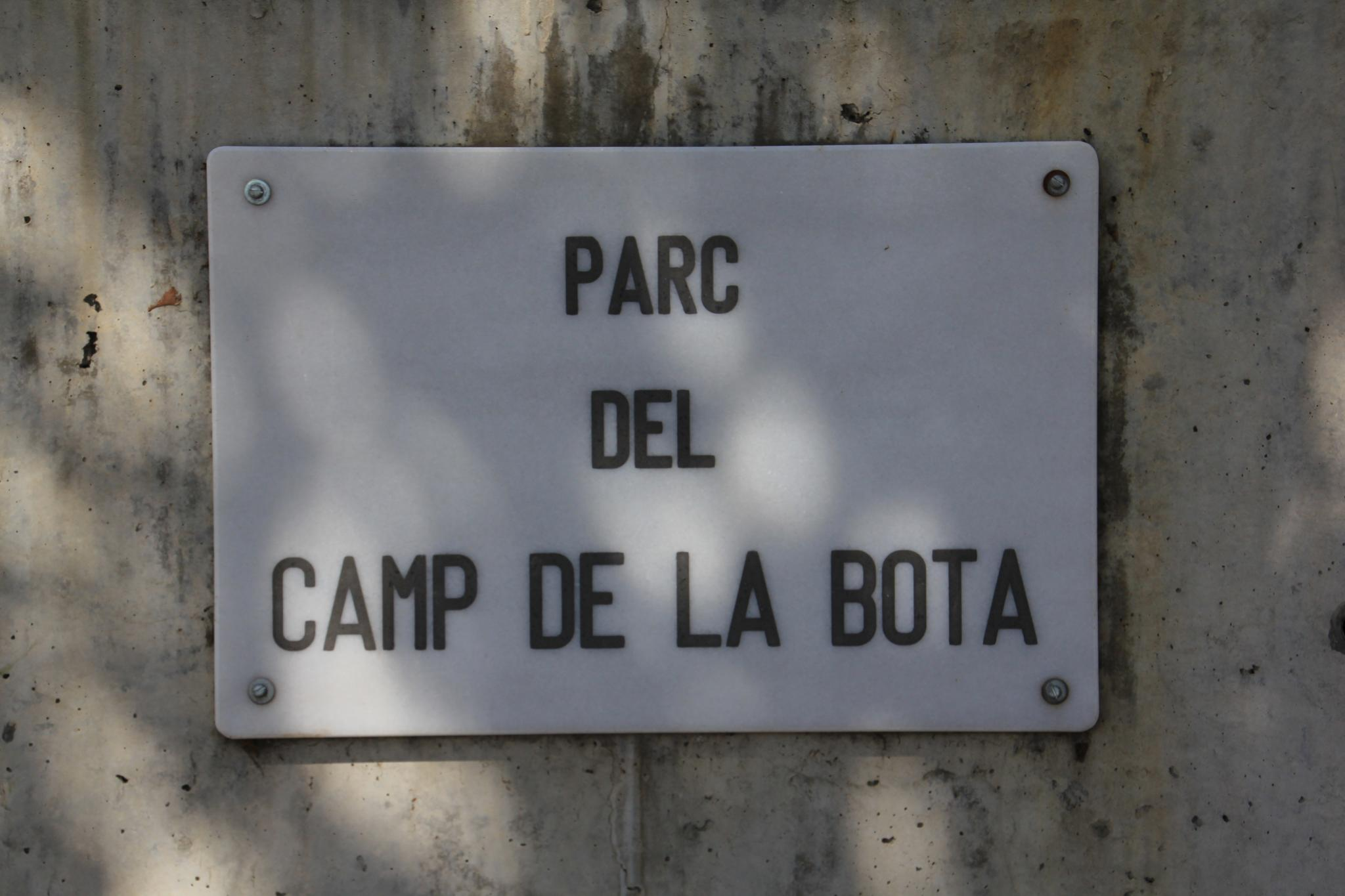 Parque del Campo de la Bota, junto al Parque del Fórum, en Barcelona.